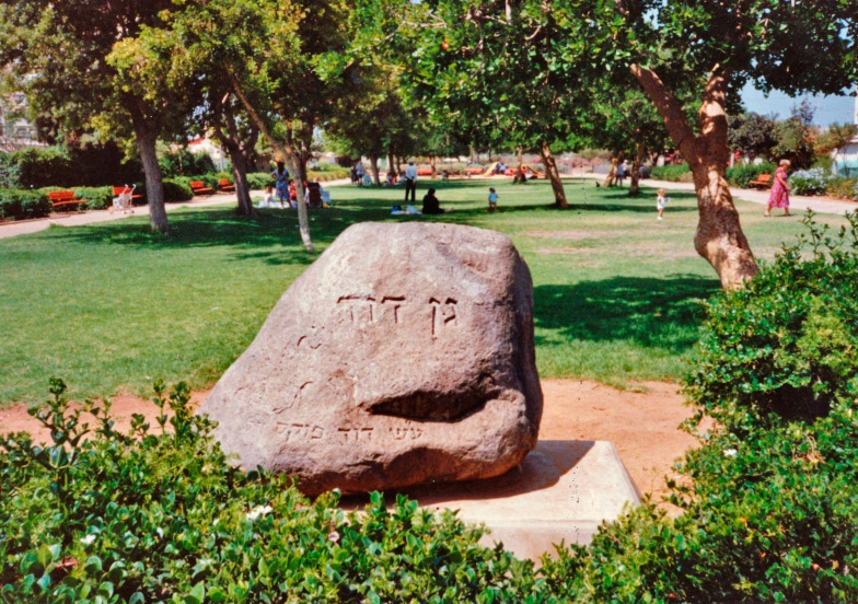 Камень памяти мэра г. Нетании Д. Фукса (1900-1975)